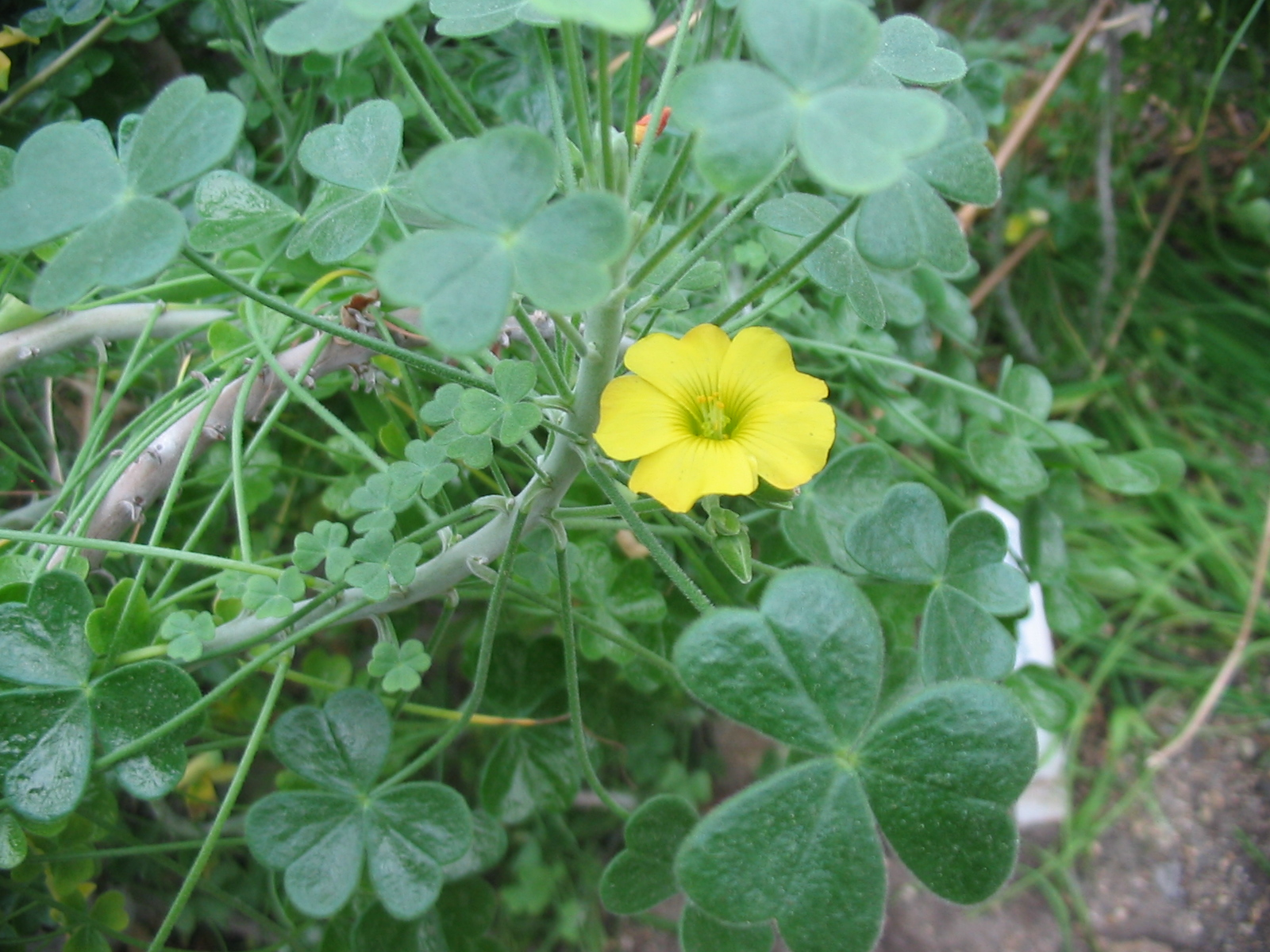 Oxalis gigantea - Blüte - Bot. Garten Berlin Dahlem